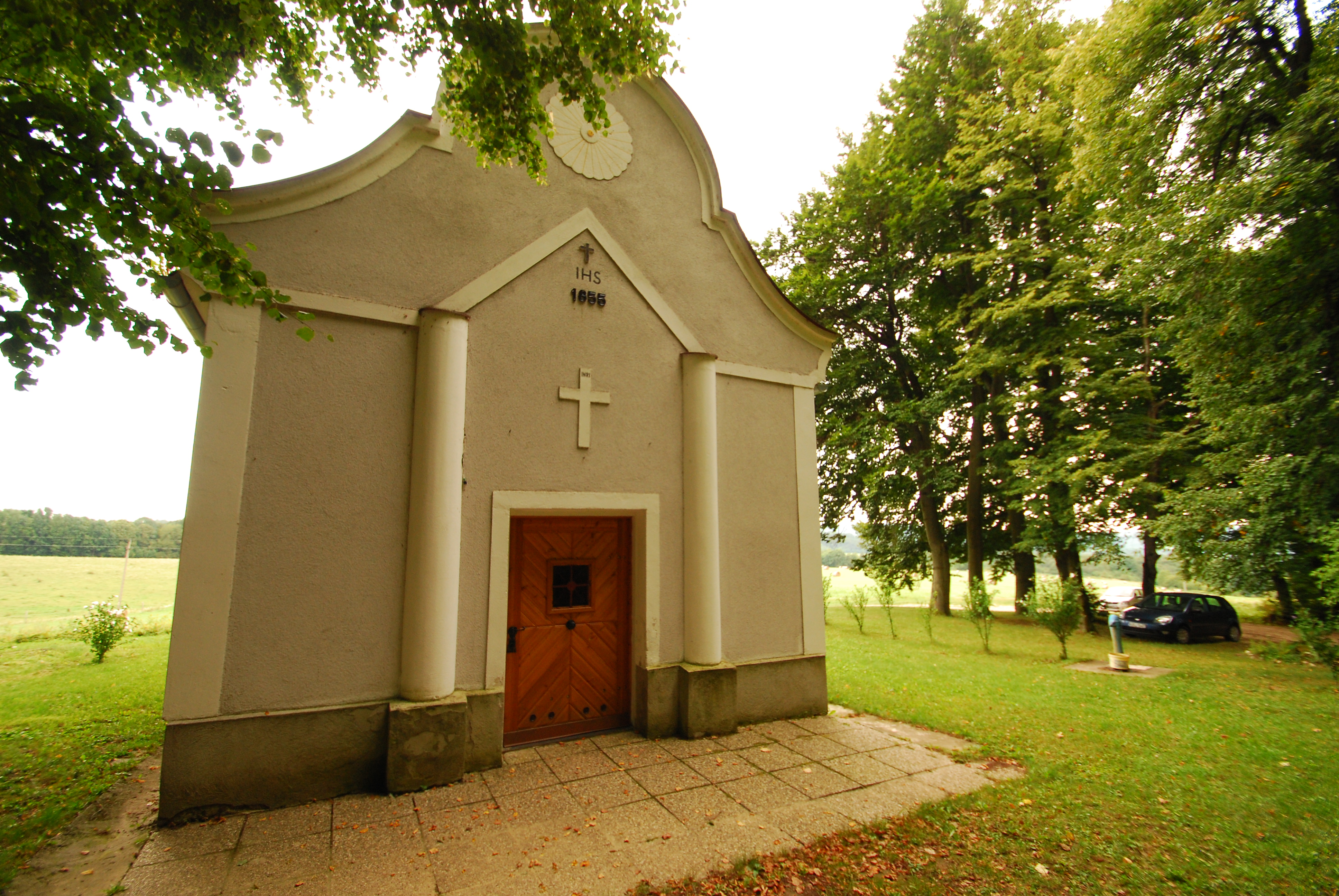 A csehbányai Mária kápolna.